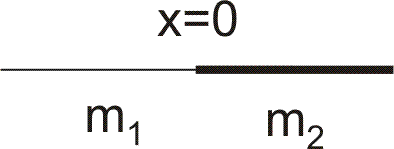 Две области с разной эффективной массой